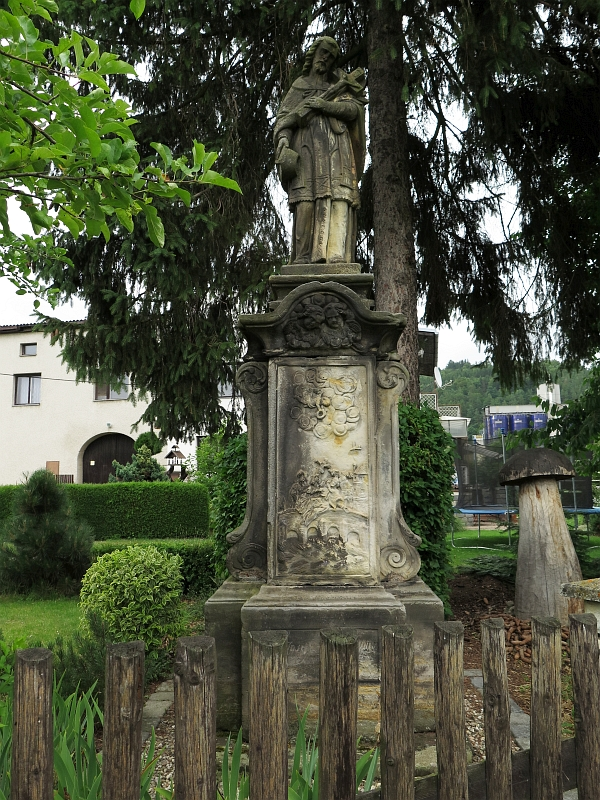 Socha svatého Jana Nepomuckého, v zahradě domu čp. 118, Sušice (Moravská Třebová).